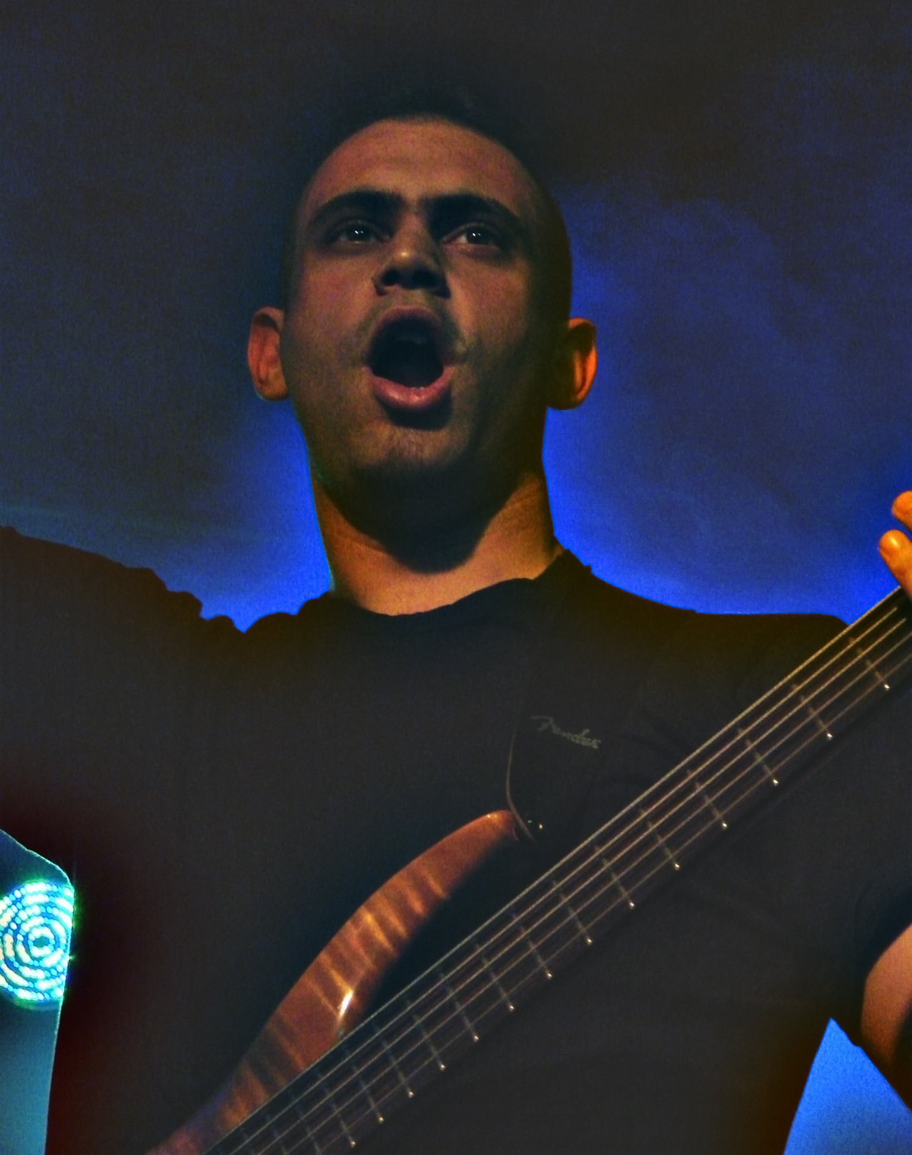 Sickening Horror, groupe de Death Metal grec, au Chaulnes Fest, le 22/03/08: Ilias Daras à la basse.